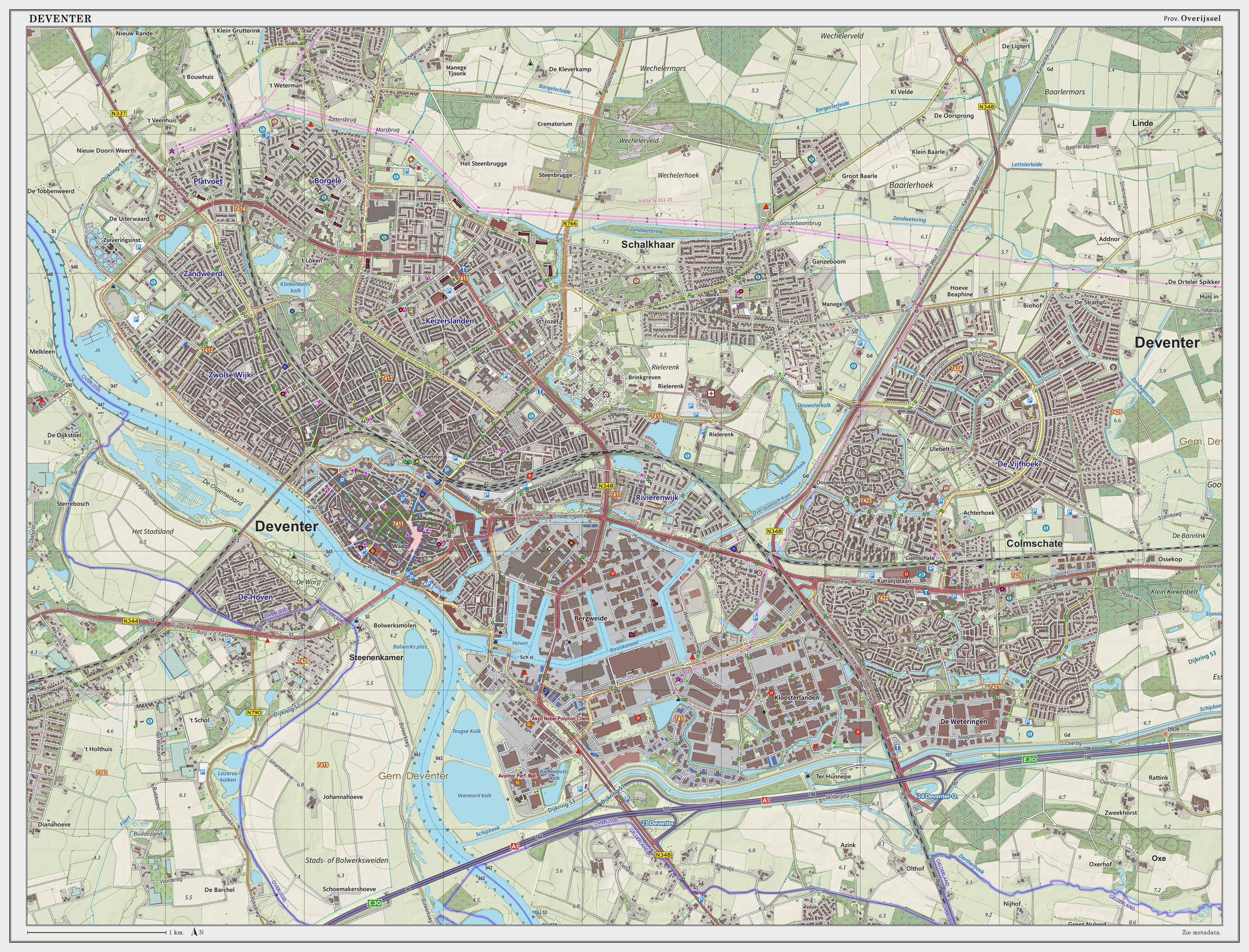 Topografische kaart van Deventer (woonplaats). Resolutie: 300 pixels/km. Kaartbeeld samengesteld uit de open geodata van de Top10NL en Top25namen (Basisregistratie Topografie, Kadaster), Creative Commons BY licentie. Gebouwvlakken uit open geodata BAG extract. Wegen uit de OpenStreetMap. Reliëfschaduw uit de Actuele Hoogtekaart AHN2. Samenstelling en kleurenschema: Jan-Willem van Aalst, met QGIS2. Zie ook de Legenda.